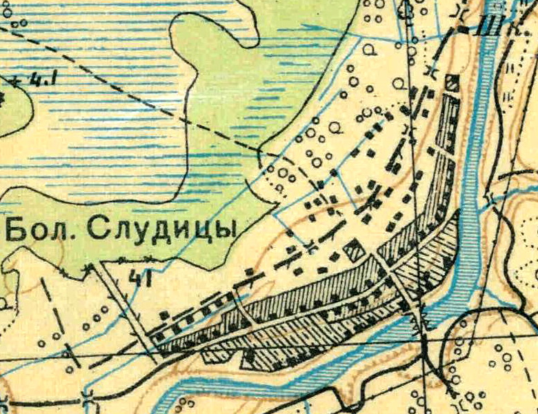 Топографическая карта Ленинградской области, квадрат О-36-25-Б-б (Бол. Слудицы), деревня Большие Слудицы